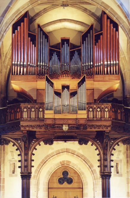 Photo de l'orgue de tribune de l'Église Saint-Rémi de Forbach